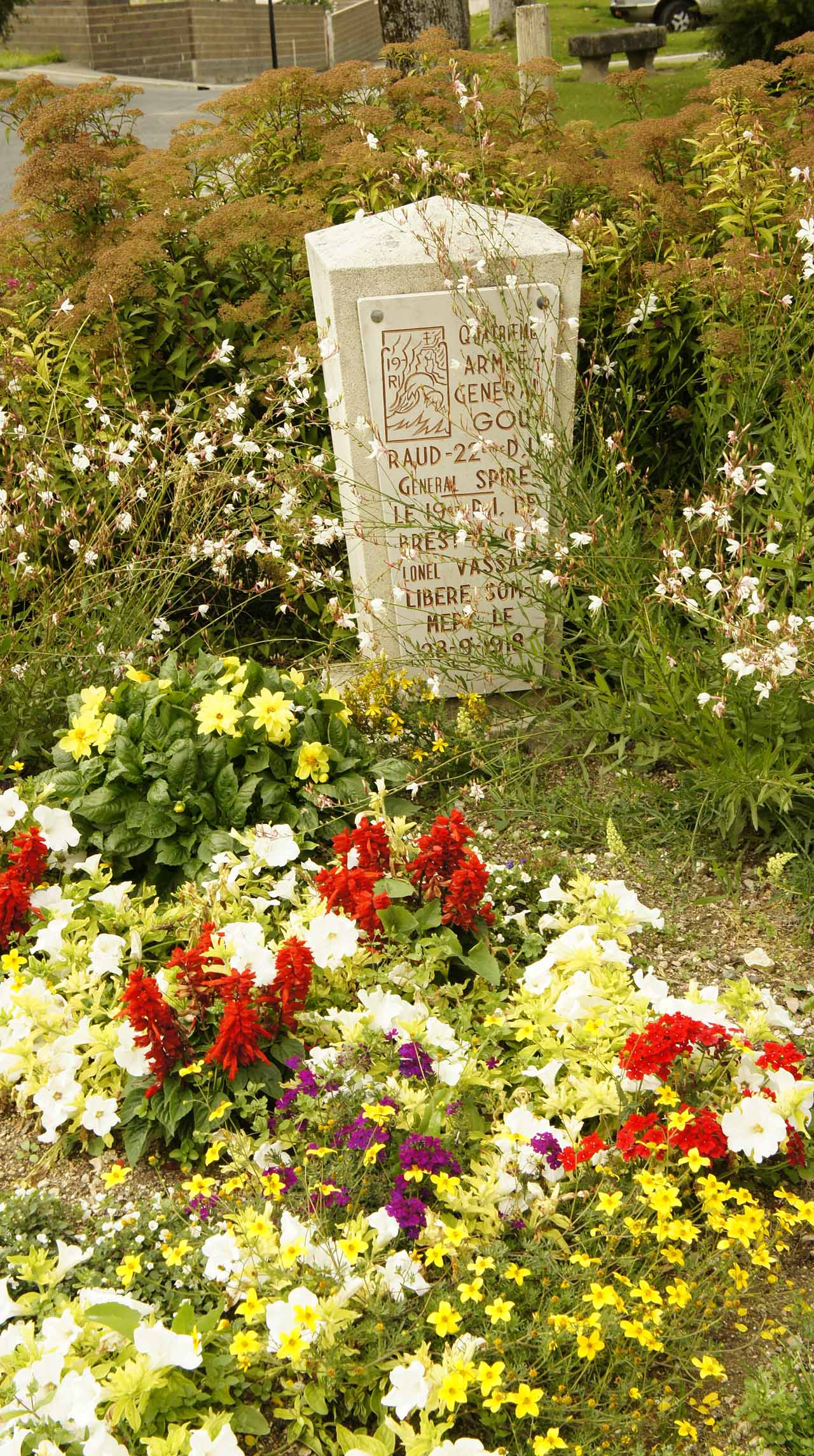 Monument en mémoire de la libération de la ville de Sommepy-Tahure par la IV armée du général Gouraud, de la 22 division d'infanterie du général Spire, du 19 régiment d'infanterie du lt-Col Vassal le 28 IX 1918.